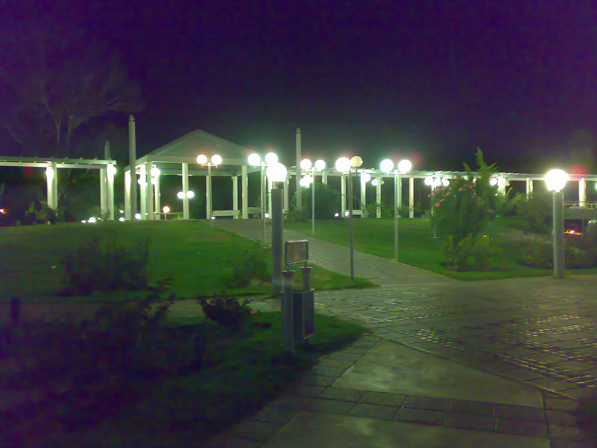 vista de parte de la plaza españa